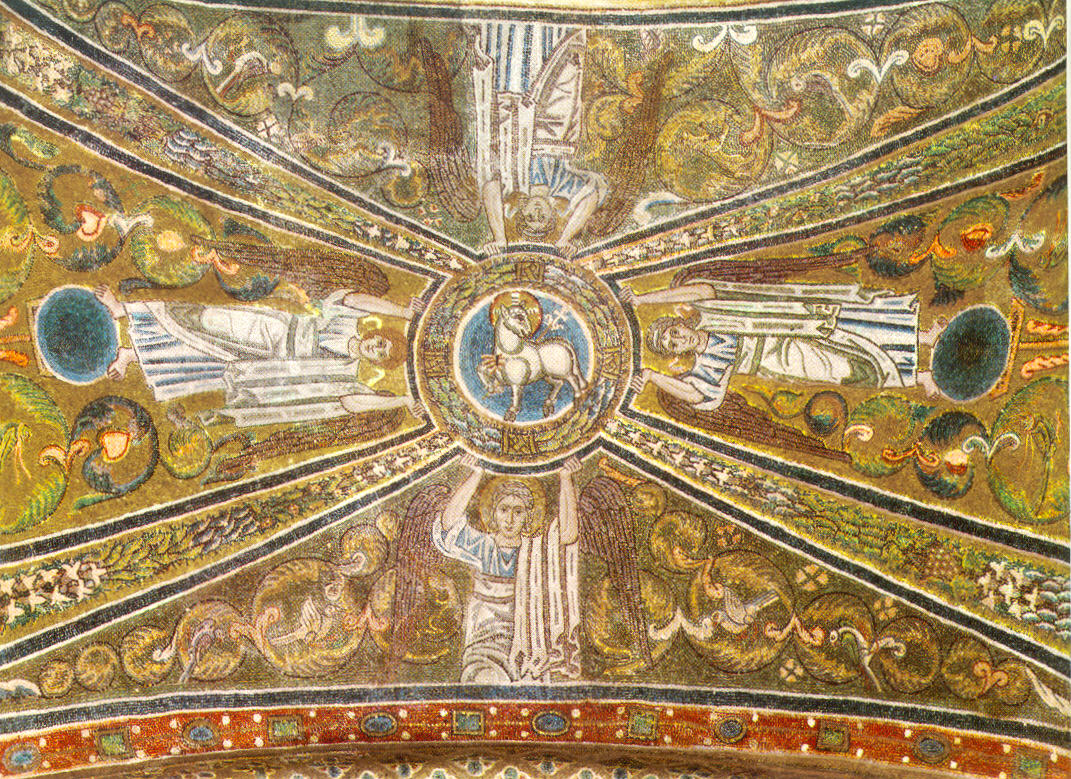 Torcello - Voute d'aretes